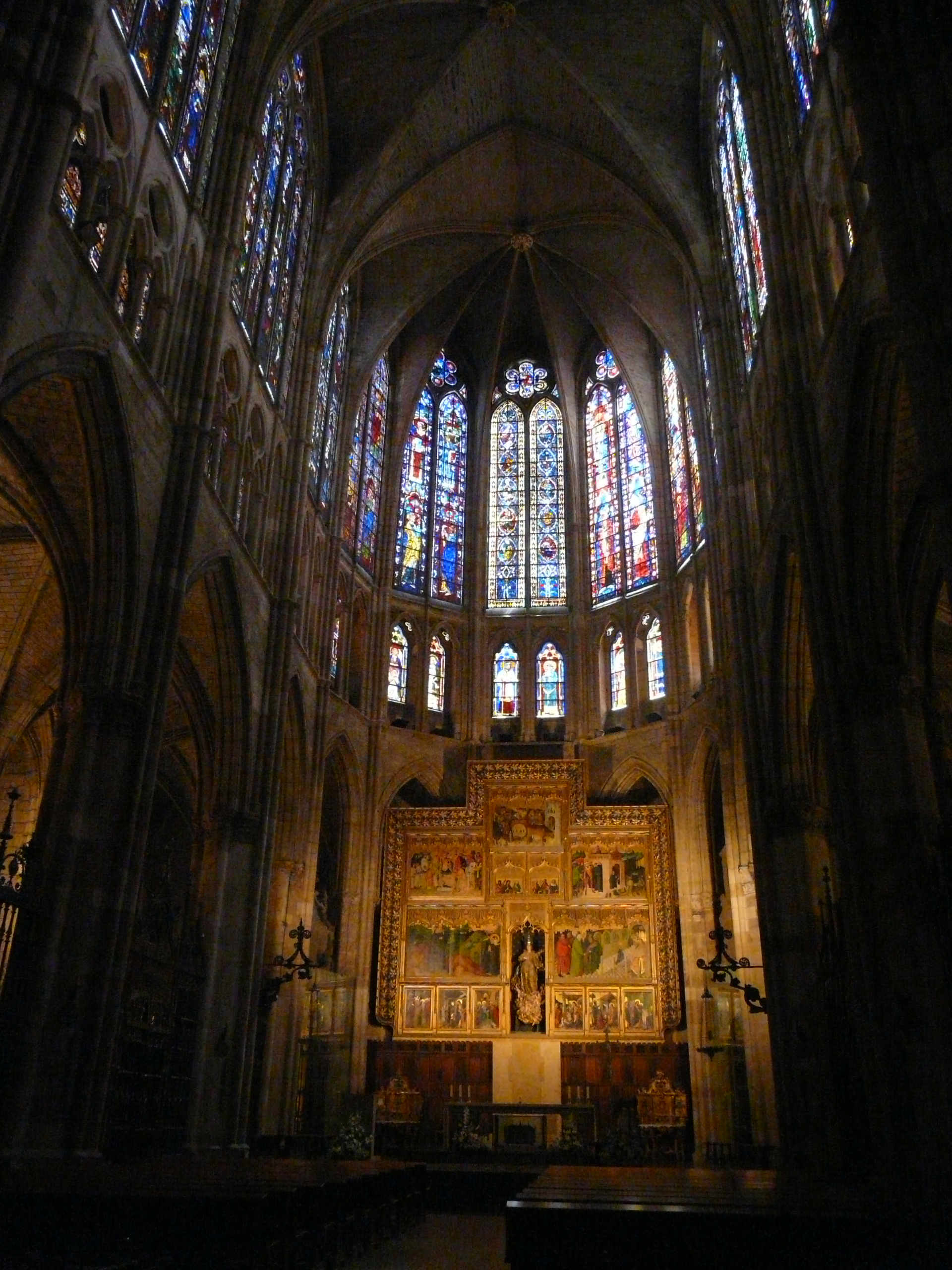 Altar Mayor, Catedral de León